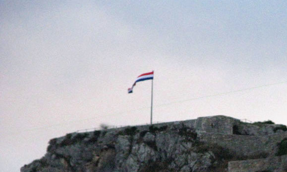 Zastava na kninskoj tvrđavi.